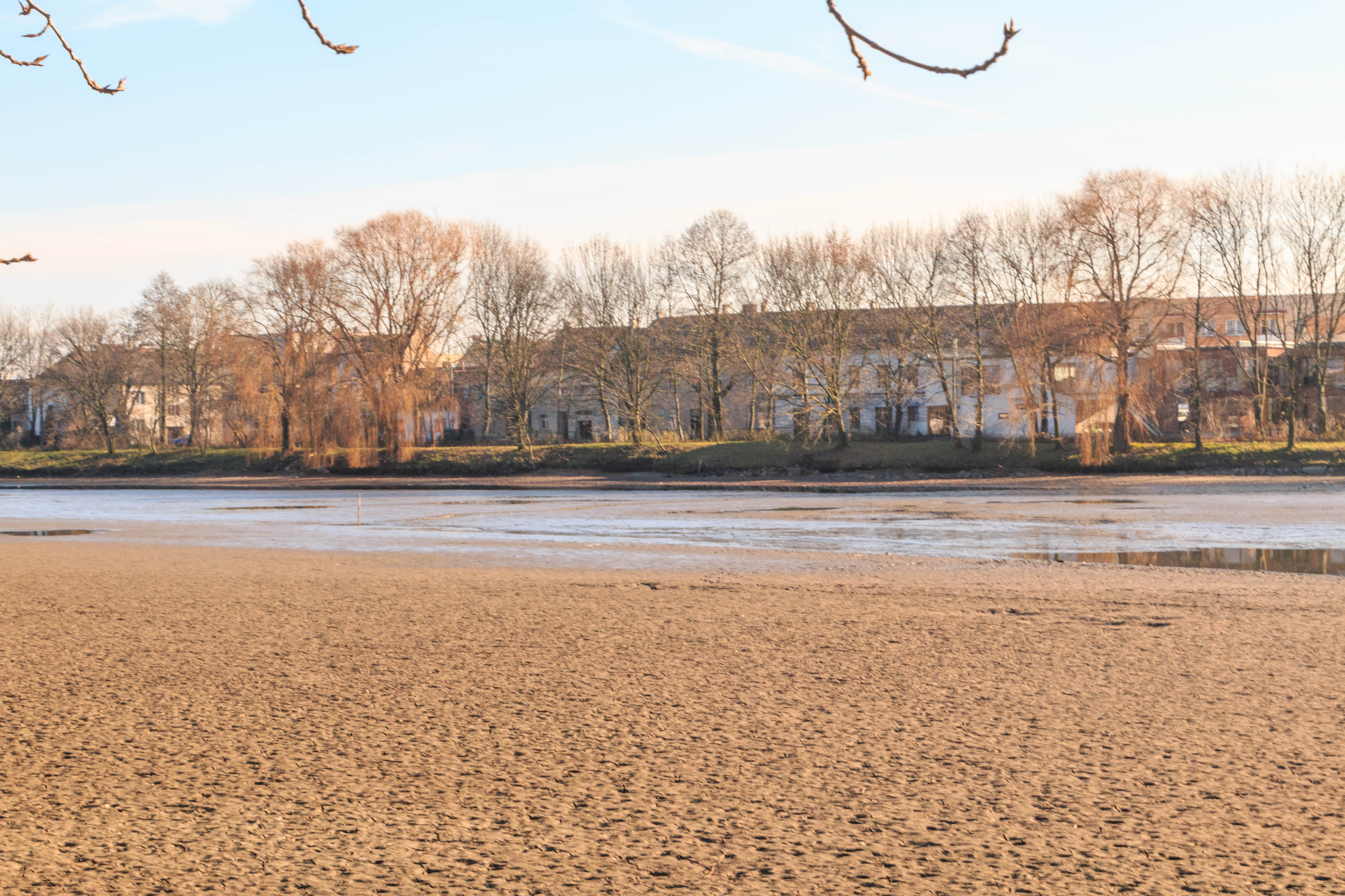 Rybník Velké jezero v Pardubicích Project: Vodstvo.